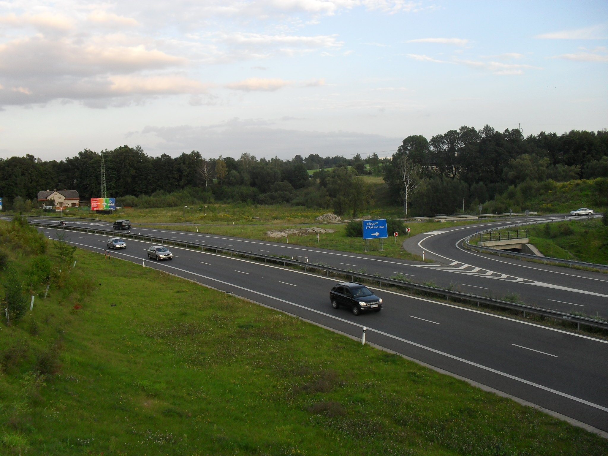 Silniční křižovatka ve Svárově